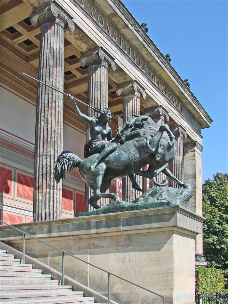 Bronze d'inspiration antique montrant le combat d'une amazone et d'une panthère situé à l'entrée de l'Altes Museum Le bâtiment de l'Altes Museum (ancien musée) a été construit entre 1823 et 1828 face au Château par Karl Friedrich Schinkel dans un style néoclassique, avec une colonnade ionique, pour abriter la collection d'art de la famille royale prussienne. Il a ouvert ses portes au public en 1830. La rotonde originale se réfère au Panthéon de Rome. Elle était invisible depuis l'extérieur car elle ne devait pas entrer en compétition avec le dôme de la cathédrale voisine. (extrait de Wikipedia) L'Altes Museum se trouve sur l'île des musées, il présente des collections d'antiquités grecques, étrusques et romaines. Article Wikipedia sur l'Altes Museum (Berlin) site officiel Le projet Museumsinsel (parcours continu dans les musées de l'île)